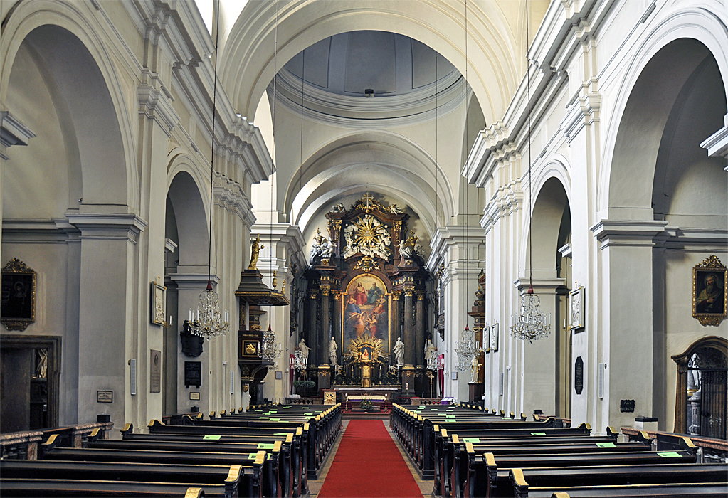 Alserkirche, Wien (Innenansicht)